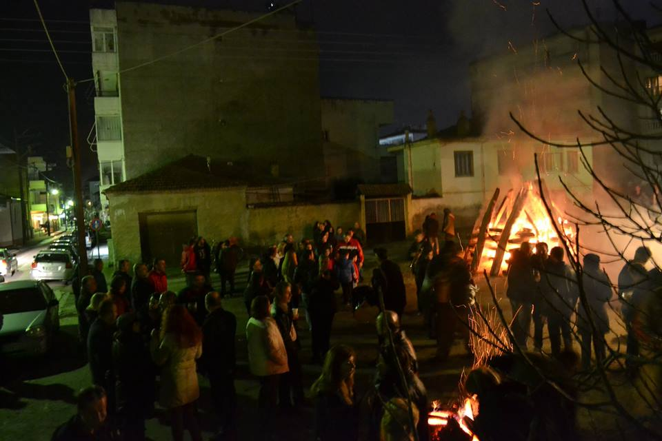 Στιγμιότυπο από τα Τσιρι-Βάρβαρα του 2014